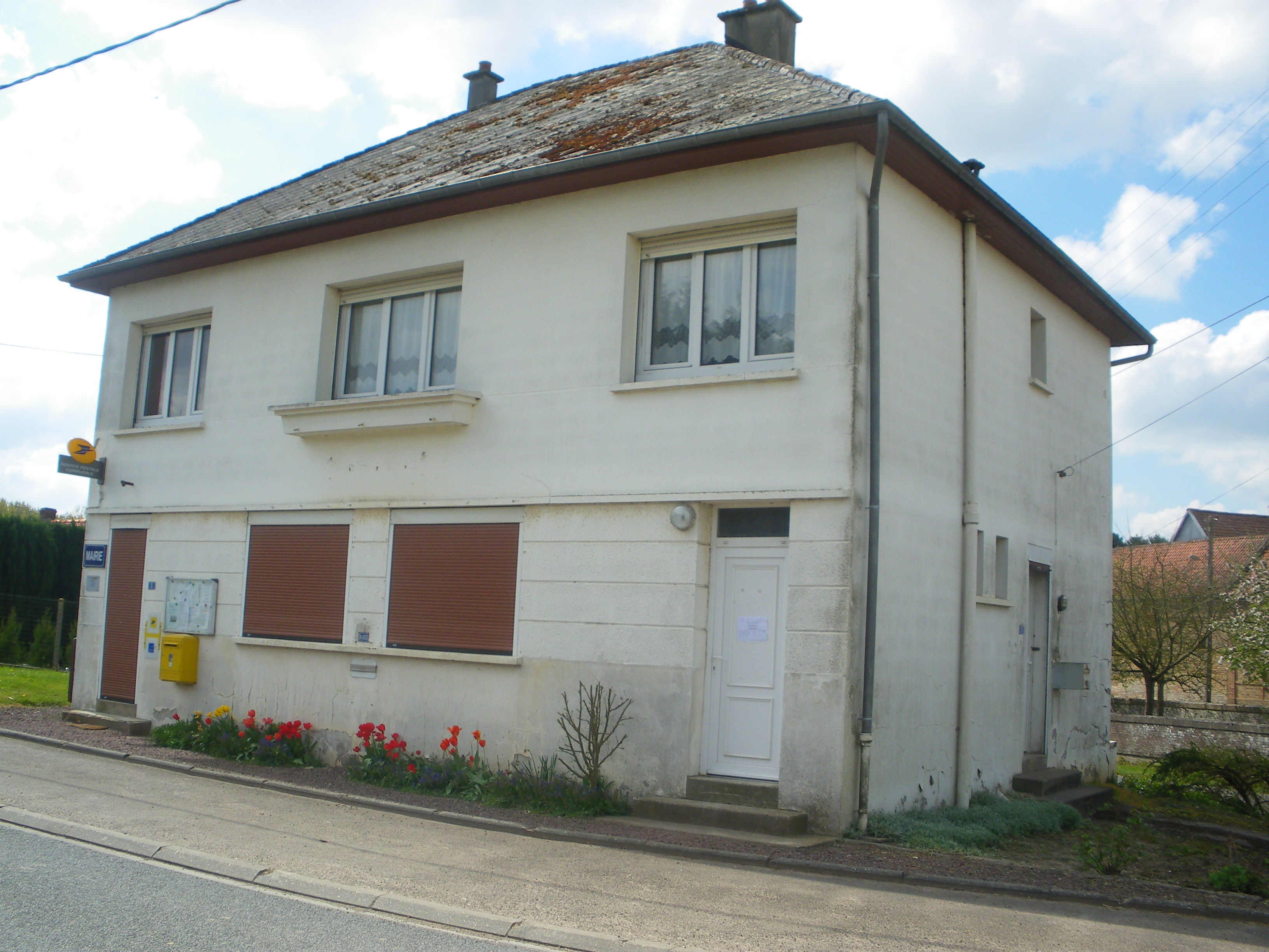 Vue de la mairie de Fortel-en-Artois. C'est également le siège de La Poste dans la commune.